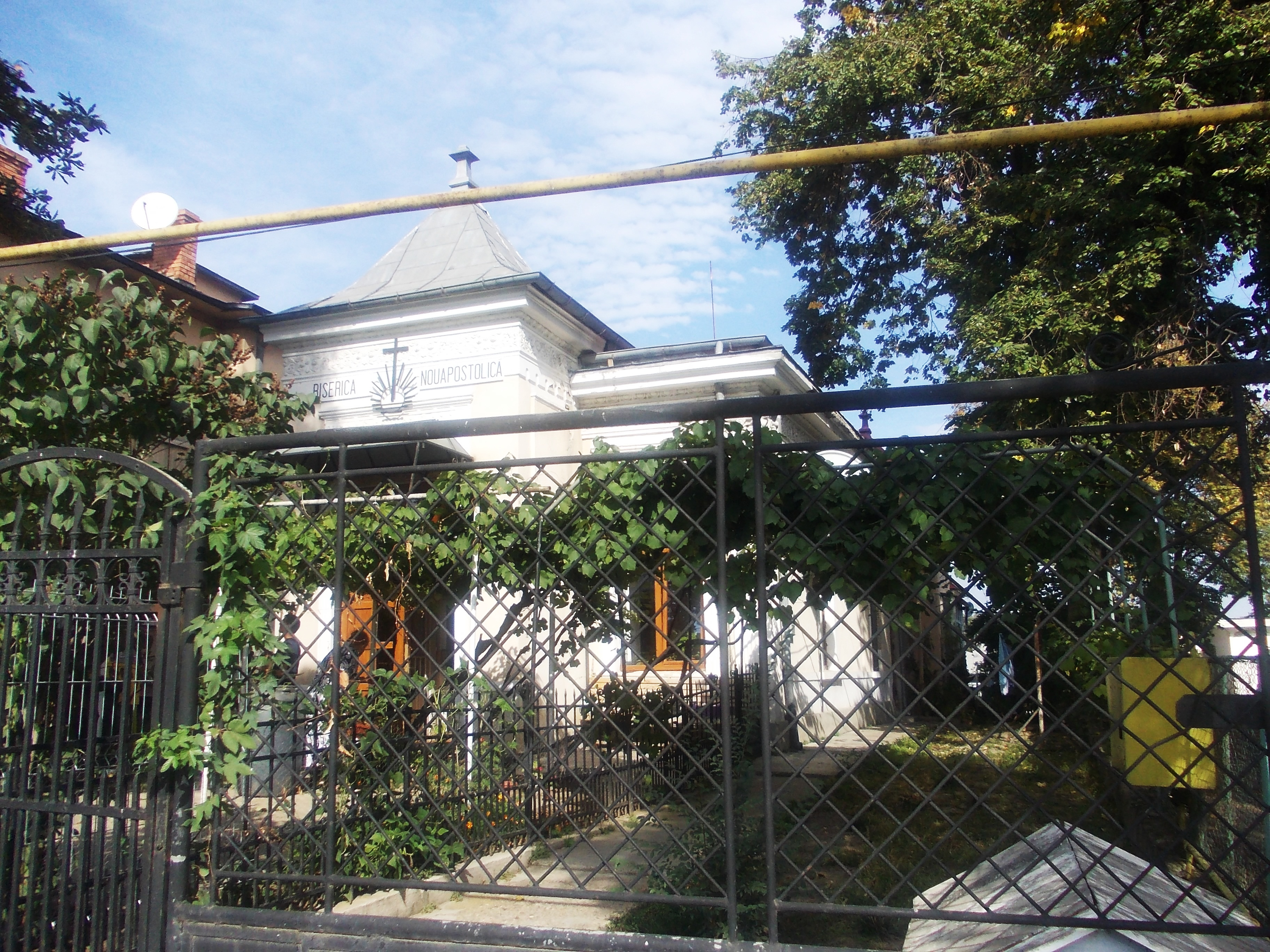 municipiul Iași, Str. Elena Doamna 35